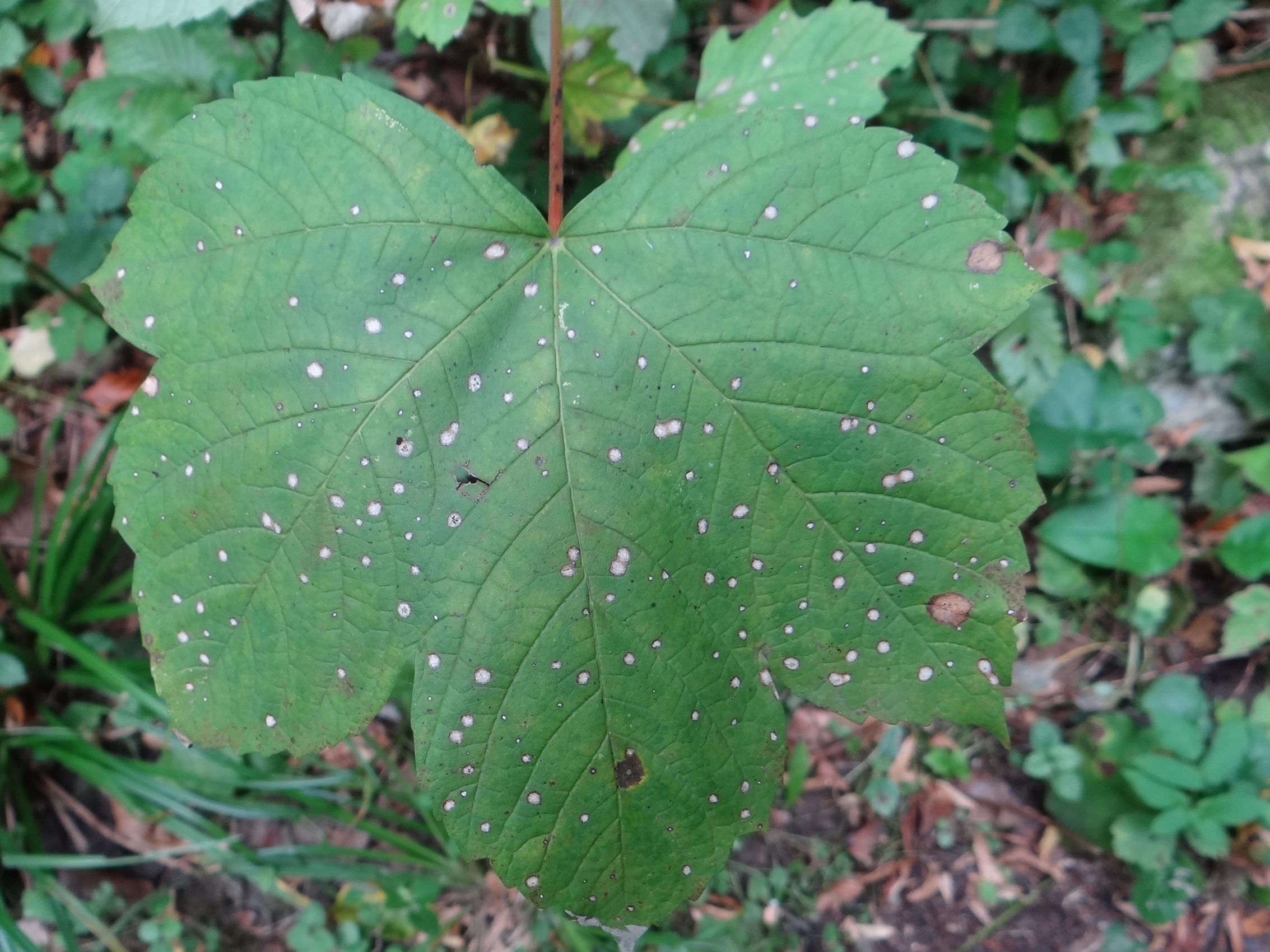 Cristulariella depraedans on leaf Acer campestris. Location: Poland, Dolina Będkowska